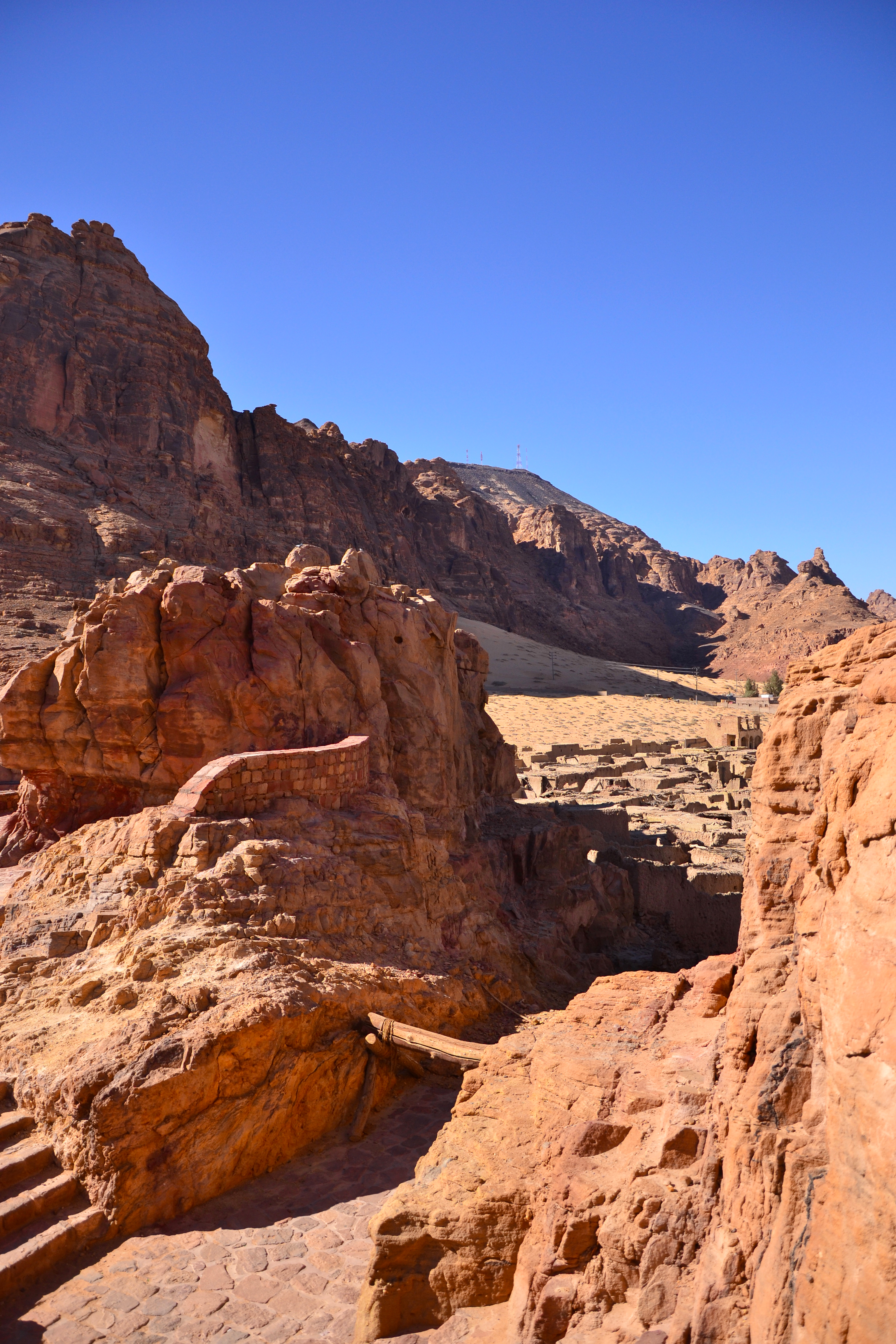 Al Ula